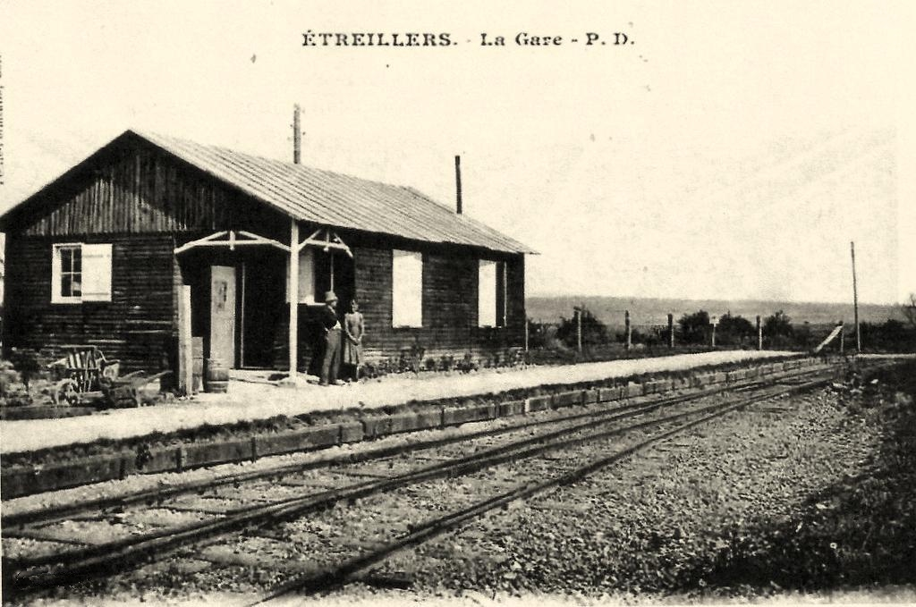 La Gare provisoire vers 1920.